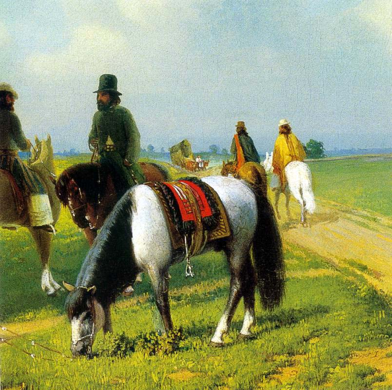 Un alto en el campo (detalle). Óleo sobre tela. 75,5 x 166,5. Museo Nacional de Bellas Artes, Buenos Aires